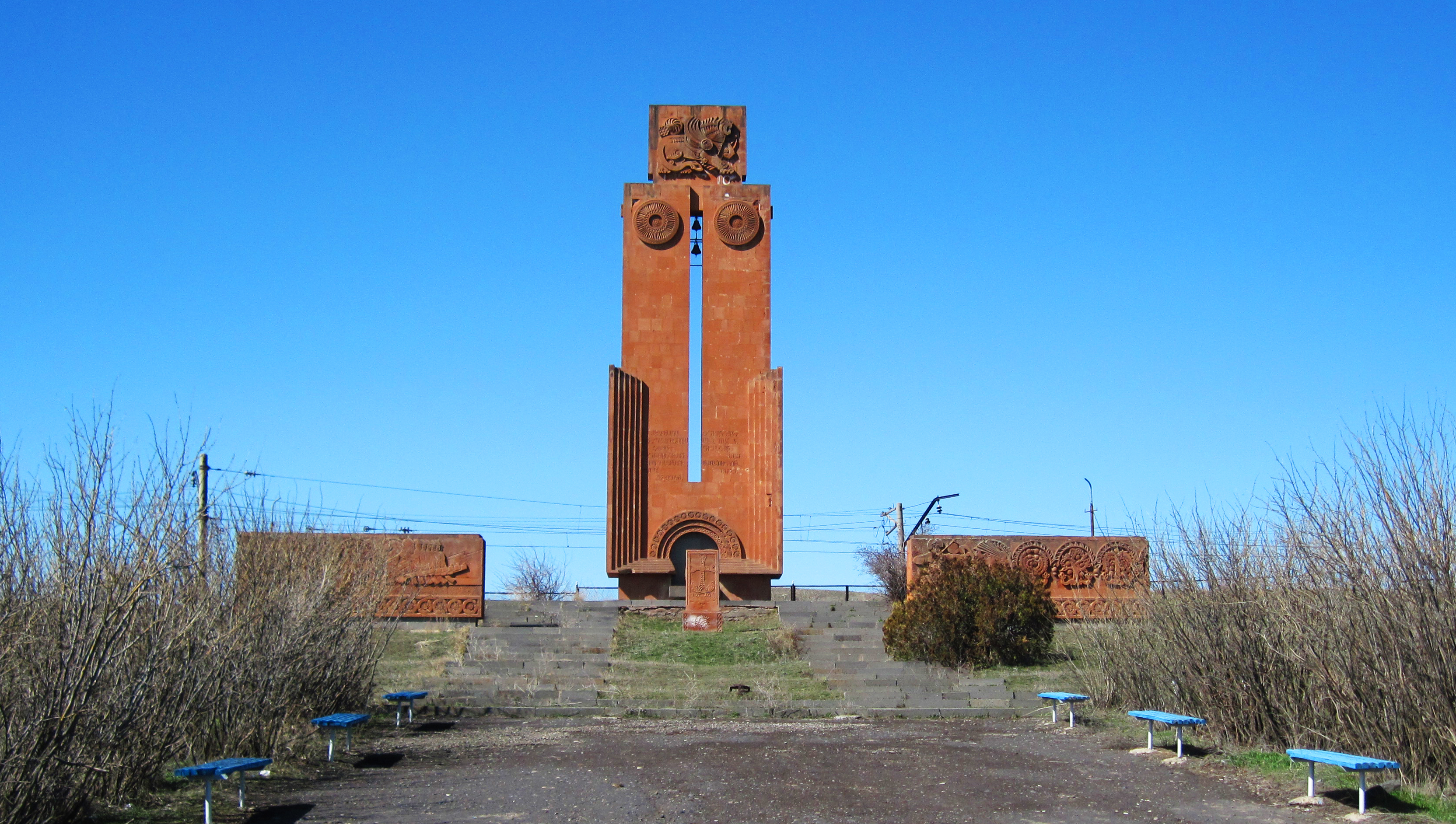 Հուշարձան Երկրորդ աշխարհամարտում զոհվածներին, Շիրակի մարզի գյուղ Բագրավանում 22/2